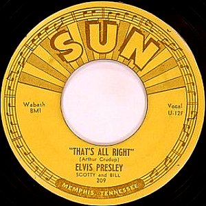 A capa do Single "that's all right", de Elvis Presley.